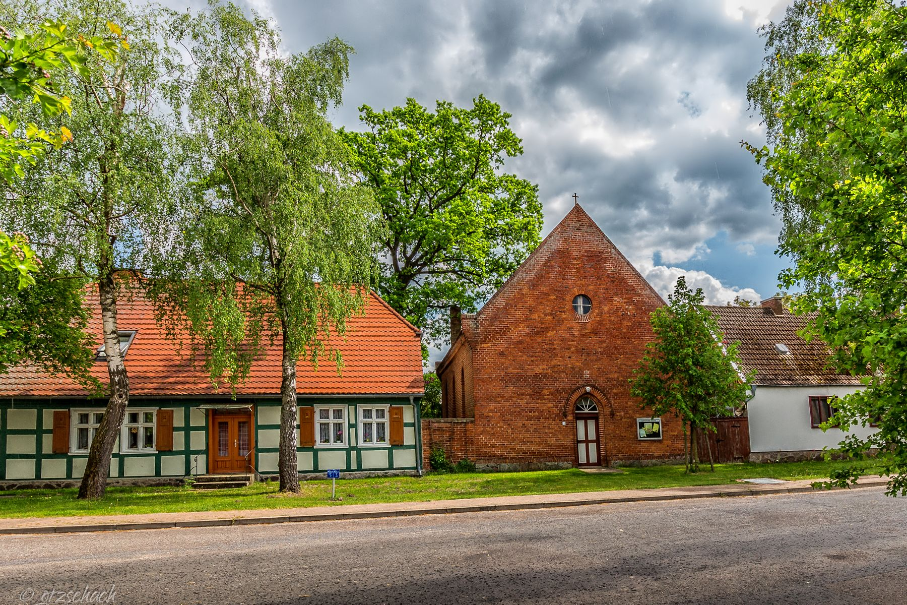 Ev.-lutherische (altlutherische) Kirche mit straßenseitigen Mauern